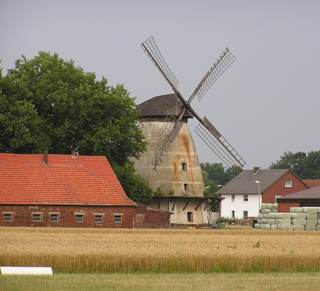 Windmühle in Minden-Rodenbeck, Nordrhein-Westfalen. Die Mühle ist Teil der Westfälischen Mühlenstraße.